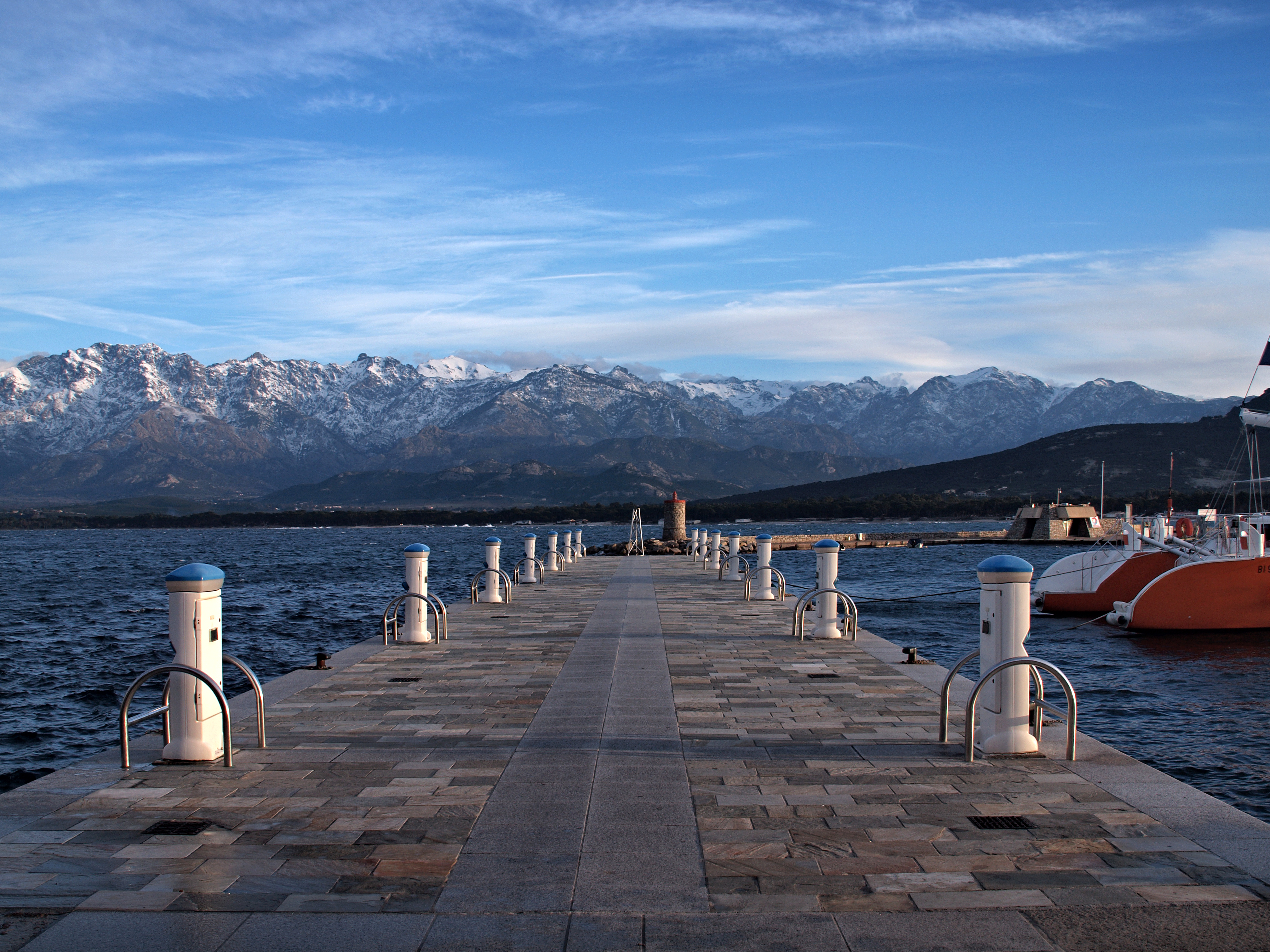 Calvi (Corse) - Quai d'Honneur Jacques et Marc Linski, navigateurs décédés tragiquement en mer le 2 février 1996